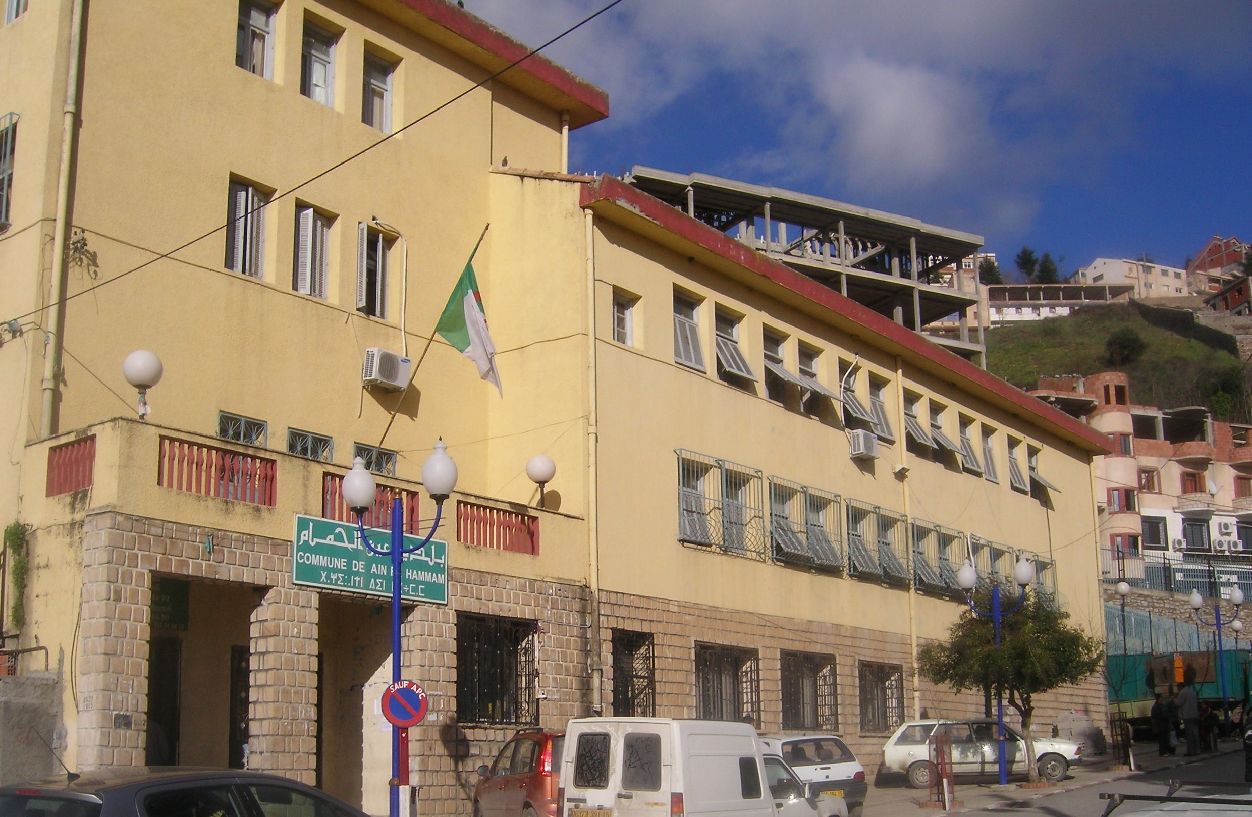 façade principale de la mairie.